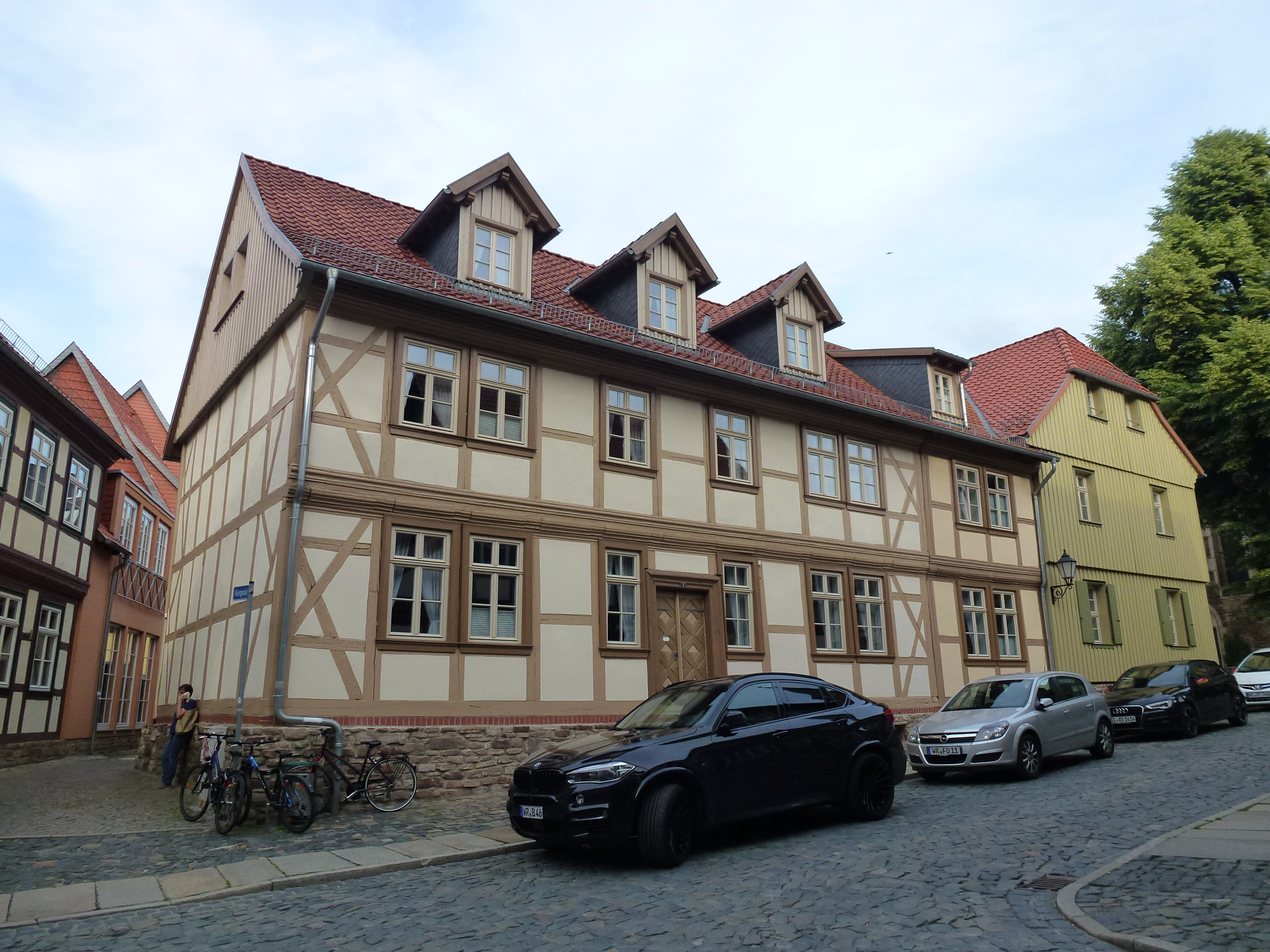 Haus Oberpfarrkirchhof 3 in Wernigerode